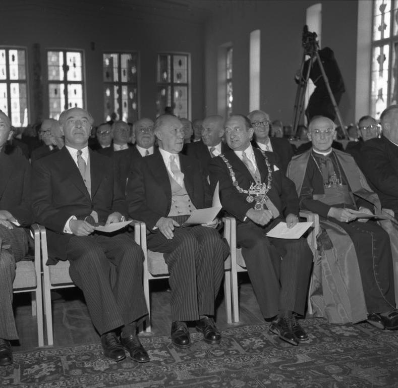 Einweihung des wiederaufgebauten Gürzenich